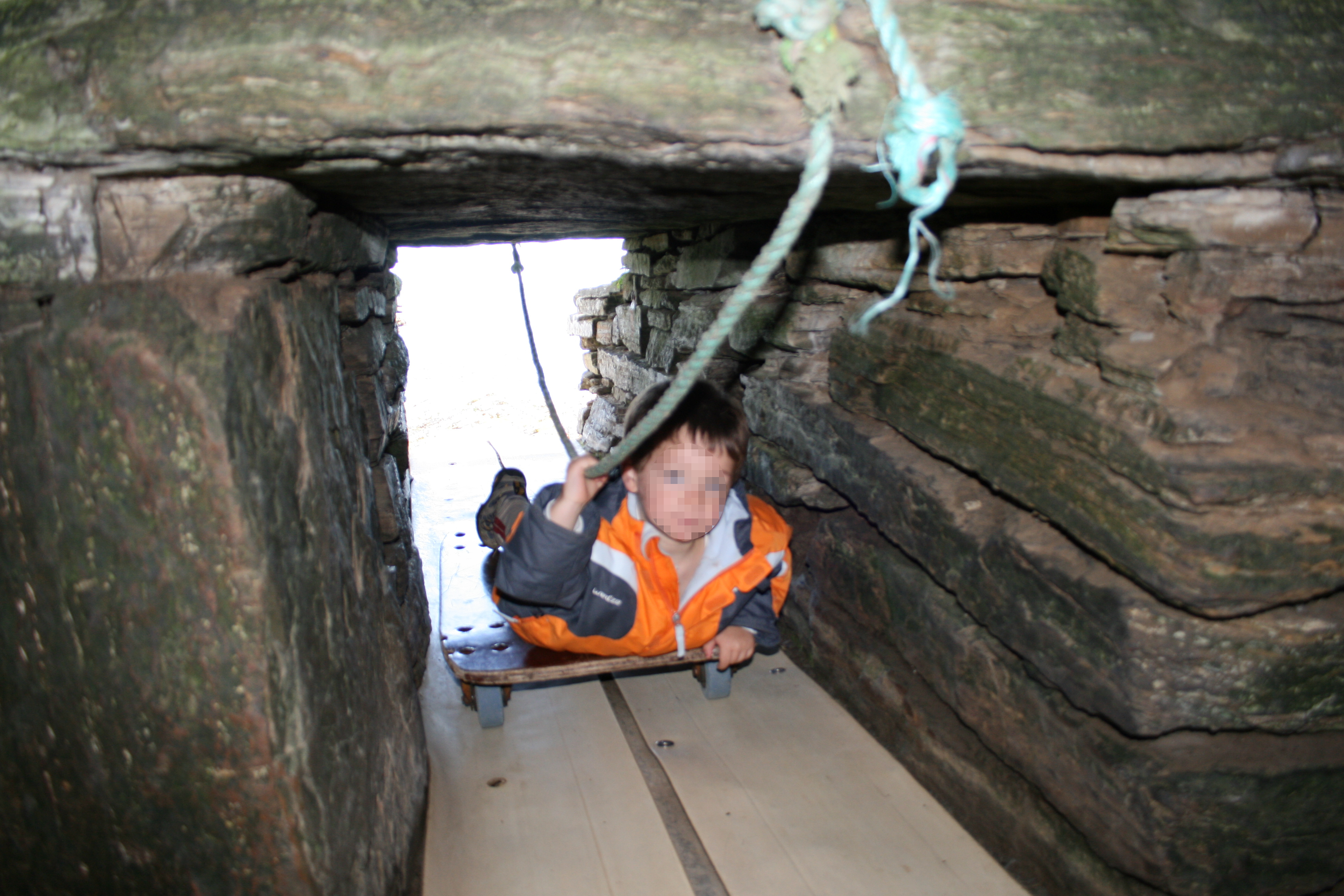 Tumba de la Águilas, enterramiento neolítico. Acceso con una carretilla a través de un corto pasaje.